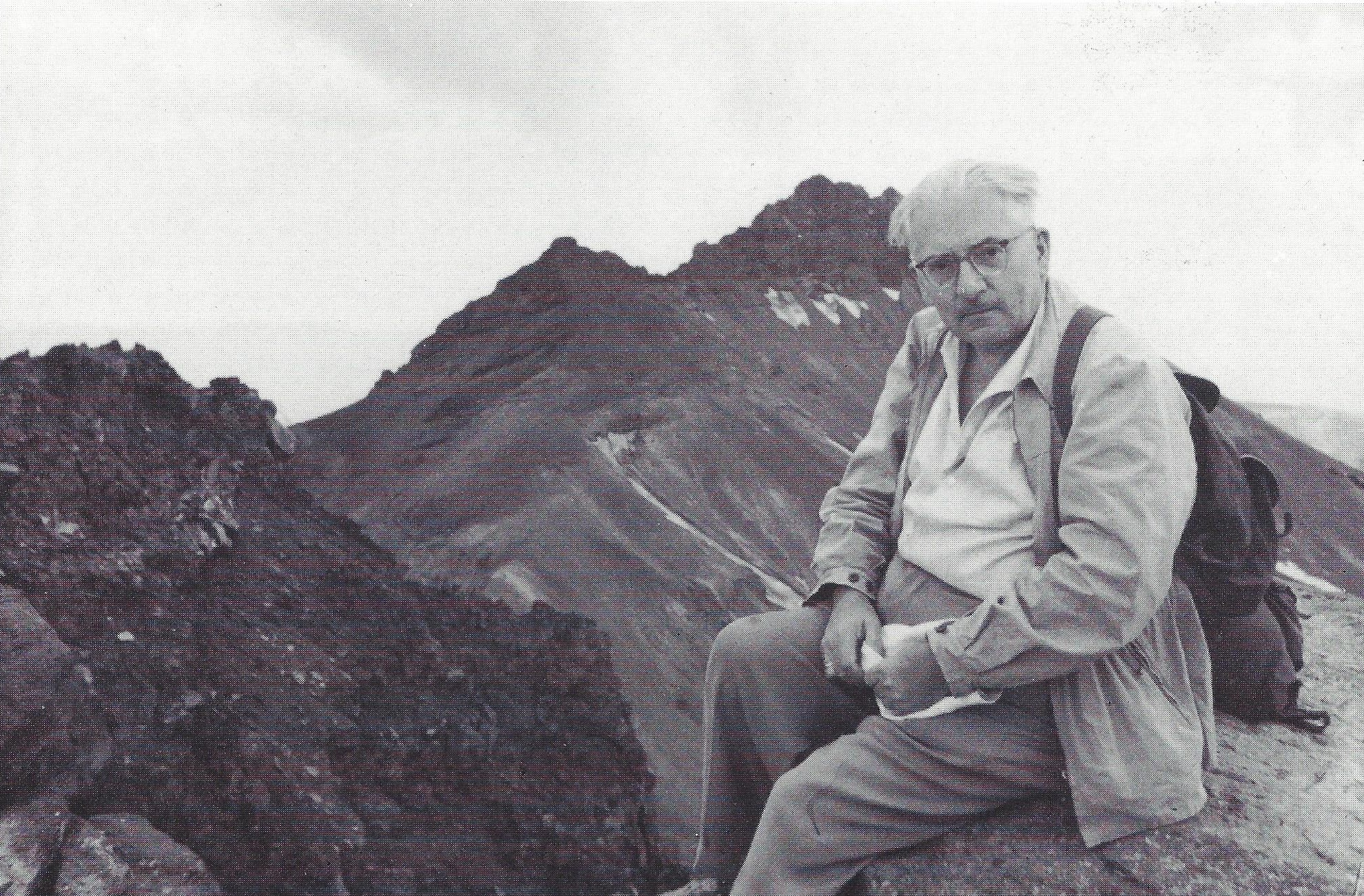 Kurt Mothes auf dem Aragaz in Armenien